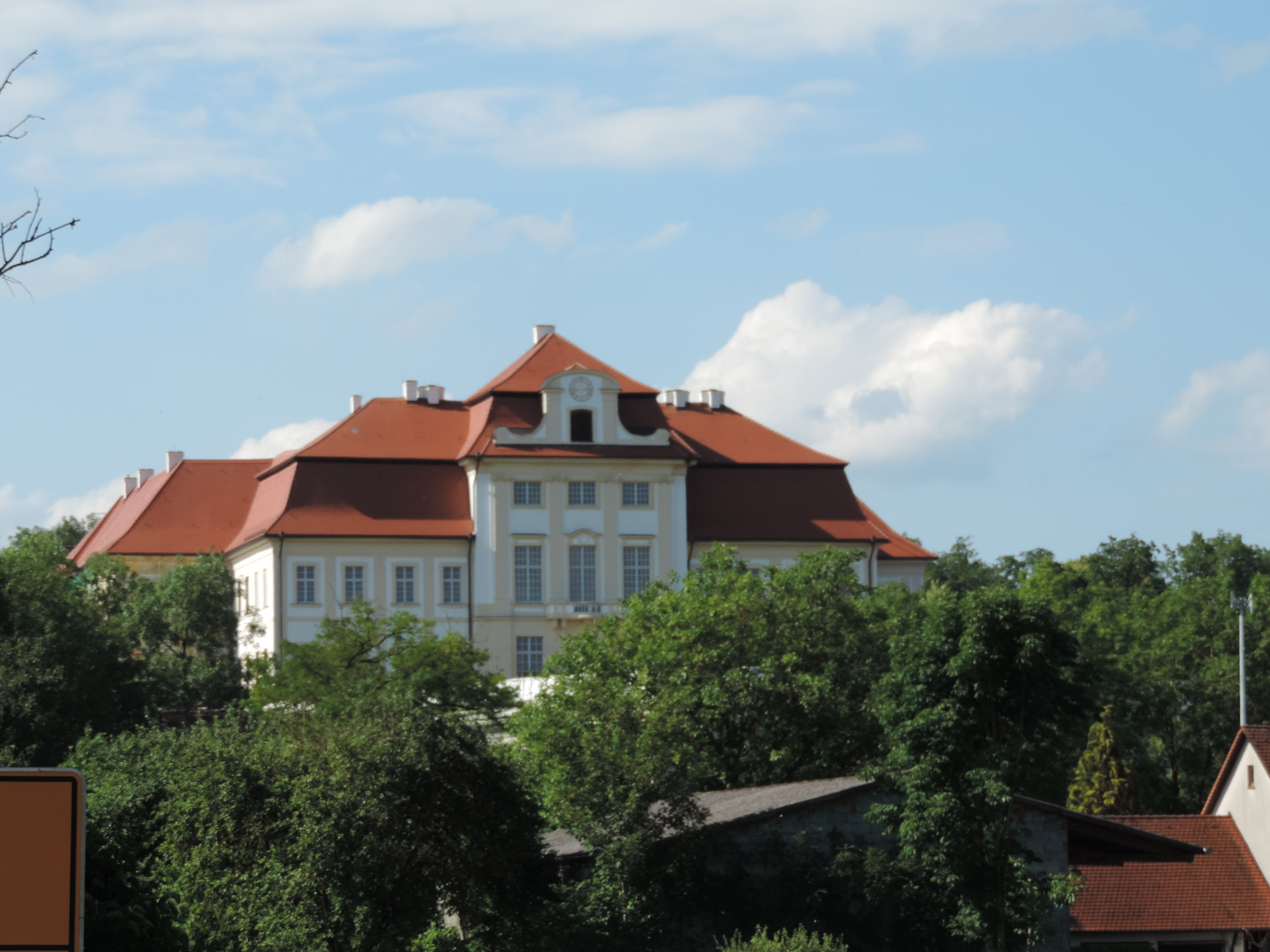 Schauseite von Schloss Bertholdsheim